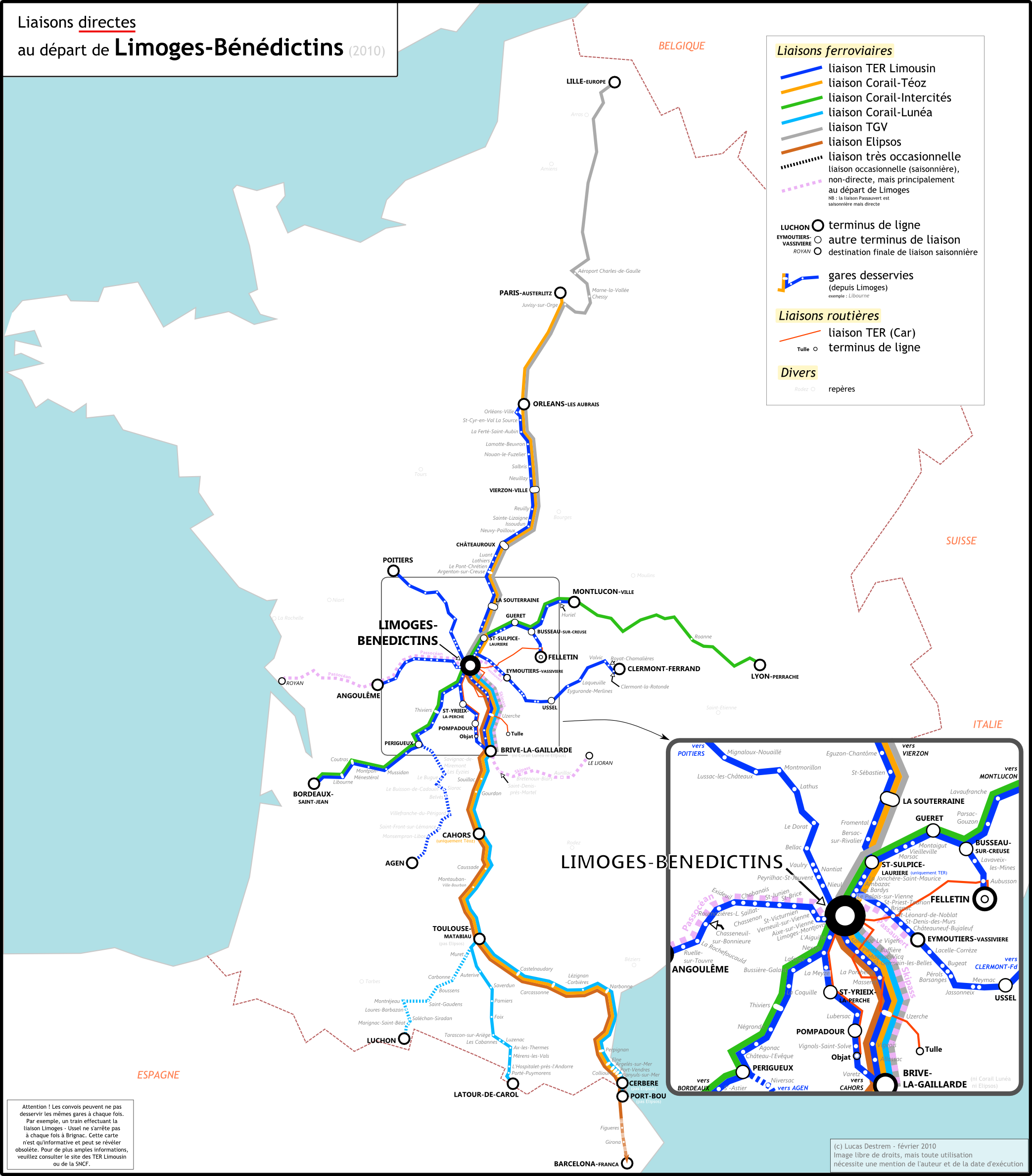 Dessertes ferroviaires directes au départ de la gare de Limoges-Bénédictins